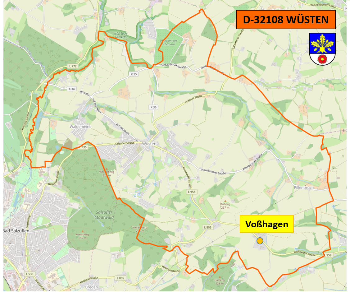 Deutschland (D) - Nordrhein-Westfalen (NW) - Kreis Lippe (LIP) - Bad Salzuflen - Wüsten: Ortsteil 'Voßhagen', Lage im Ortsgebiet